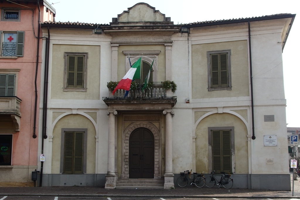 Municipio This is a photo of a monument which is part of cultural heritage of Italy.